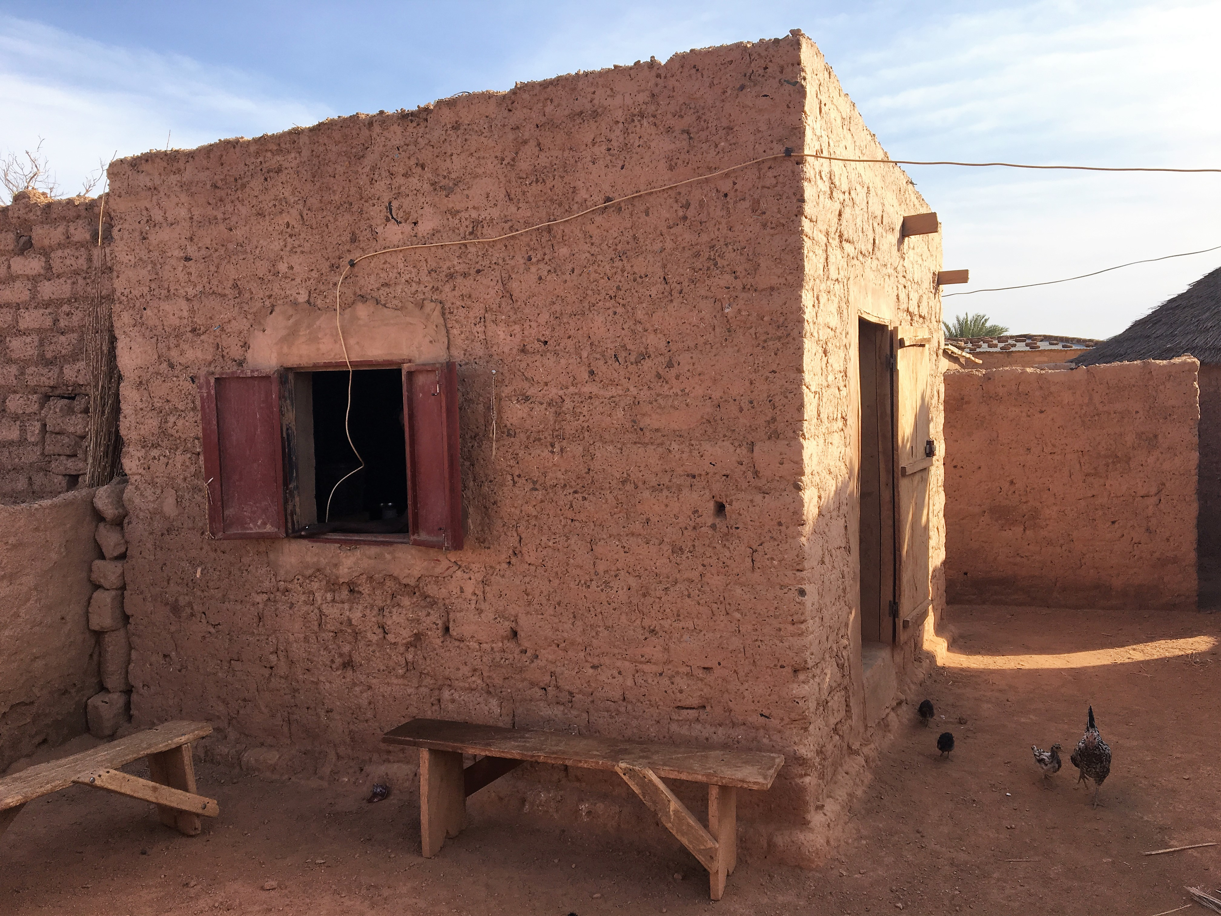 Petit commerce de Bogonam Mossi